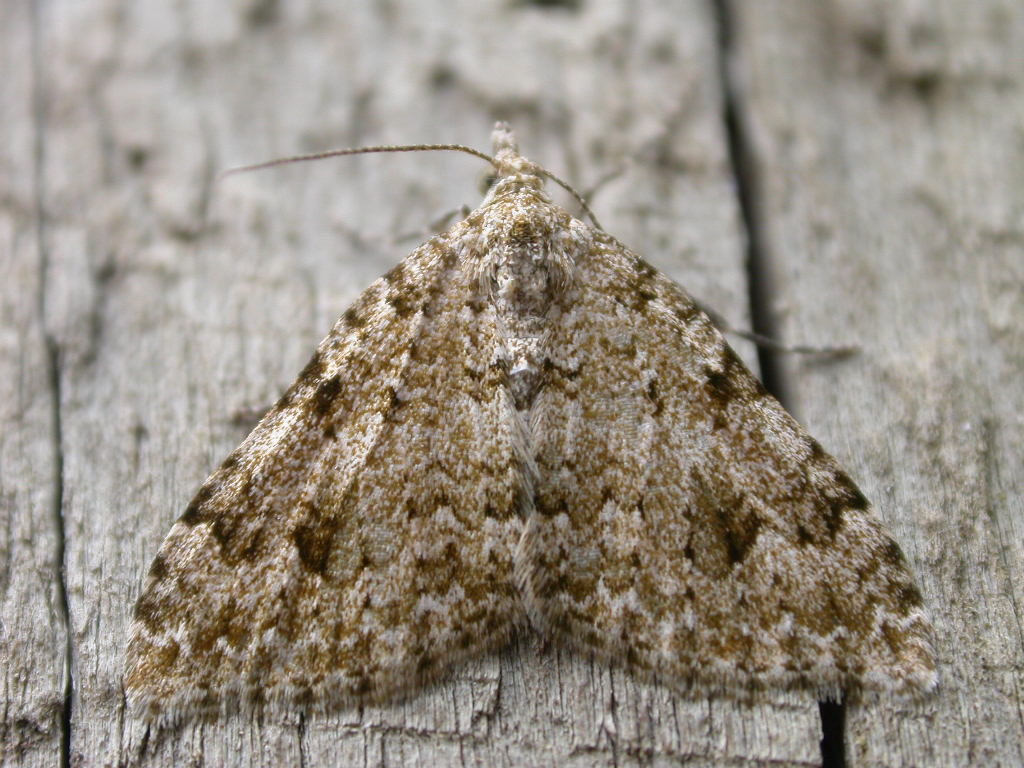 Helastia mutabilis, Tiritiri Matangi, New Zealand, 29 October 2004